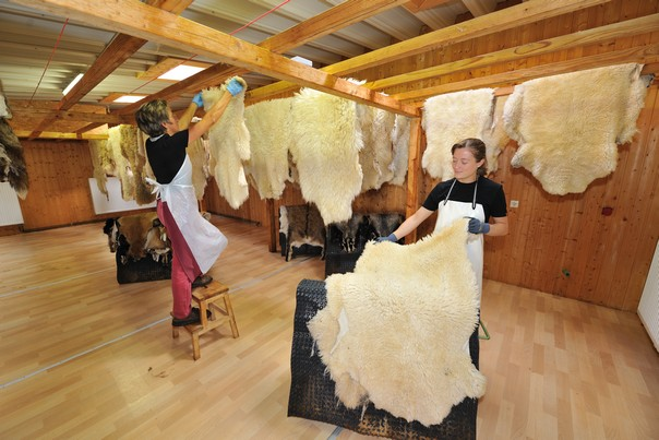 Vorbereiten der Schaffelle für die Hängetrocknung. Udo Meinelt & Söhne, Rötha